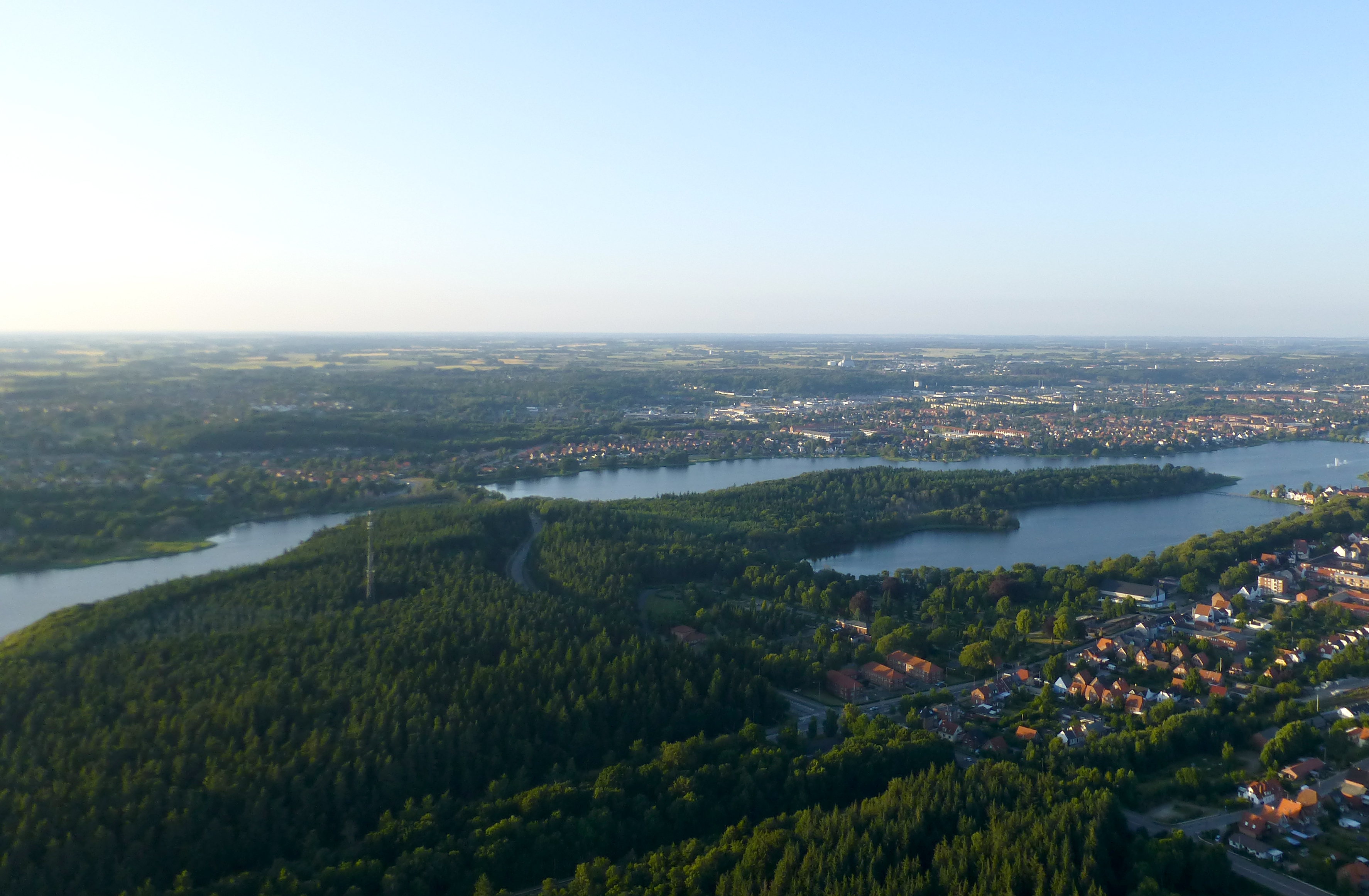 Lysbro Skov set mod nordøst med Odden og Silkeborg Langsø, og Alderslyst i baggrunden